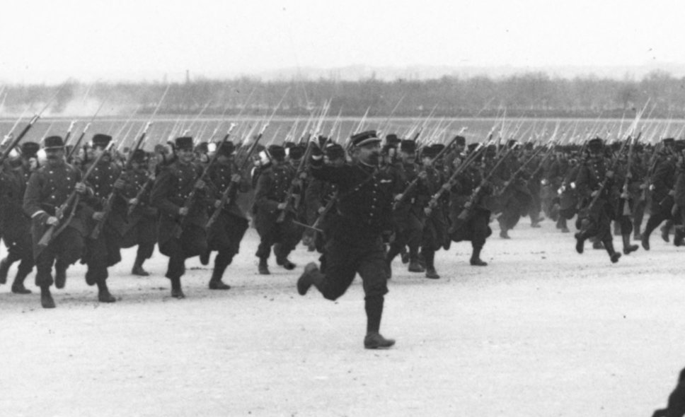 Carica a ranghi serrati allo scoperto di un reparto di fanteria francese